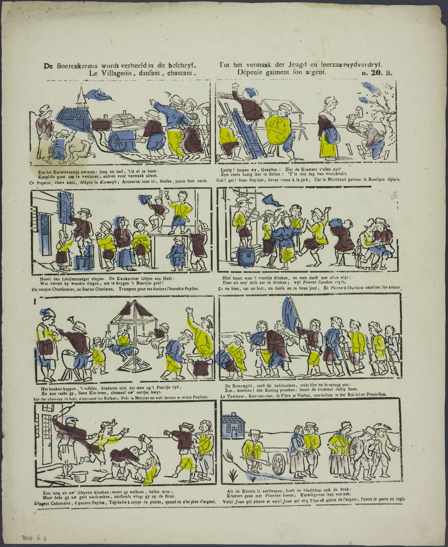 Centsprent met 4 x 2 houtsneden, met afbeeldingen (getekend in een vlotte losse stijl) van de kermis: de mensen gaan op weg naar de kermis; er worden kramen opgezet; een liedjeszanger (straatzanger met roldoek) zingt en een kwakzalver prijst zijn waar aan; er wordt gedronken, muziek gemaakt en gedanst. Men kan koekhappen, 'rafelen' (?) en in de draaimolen draaien; het boerengilde treedt in optocht aan. Als het geld op is wordt er gevochten en wordt men de straat op geschopt. De kramers gaan huiswaarts en de kermisgasten die platzak zijn ook. Bevat tweeregelige rijmende onderschriften in Nederlands en Frans.